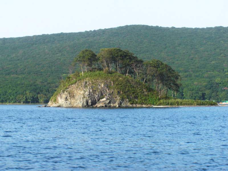 Остров Папенберга (он же остров Змеиный, он же «остров на двоих») у входа в южную часть бухты Новик острова Русский